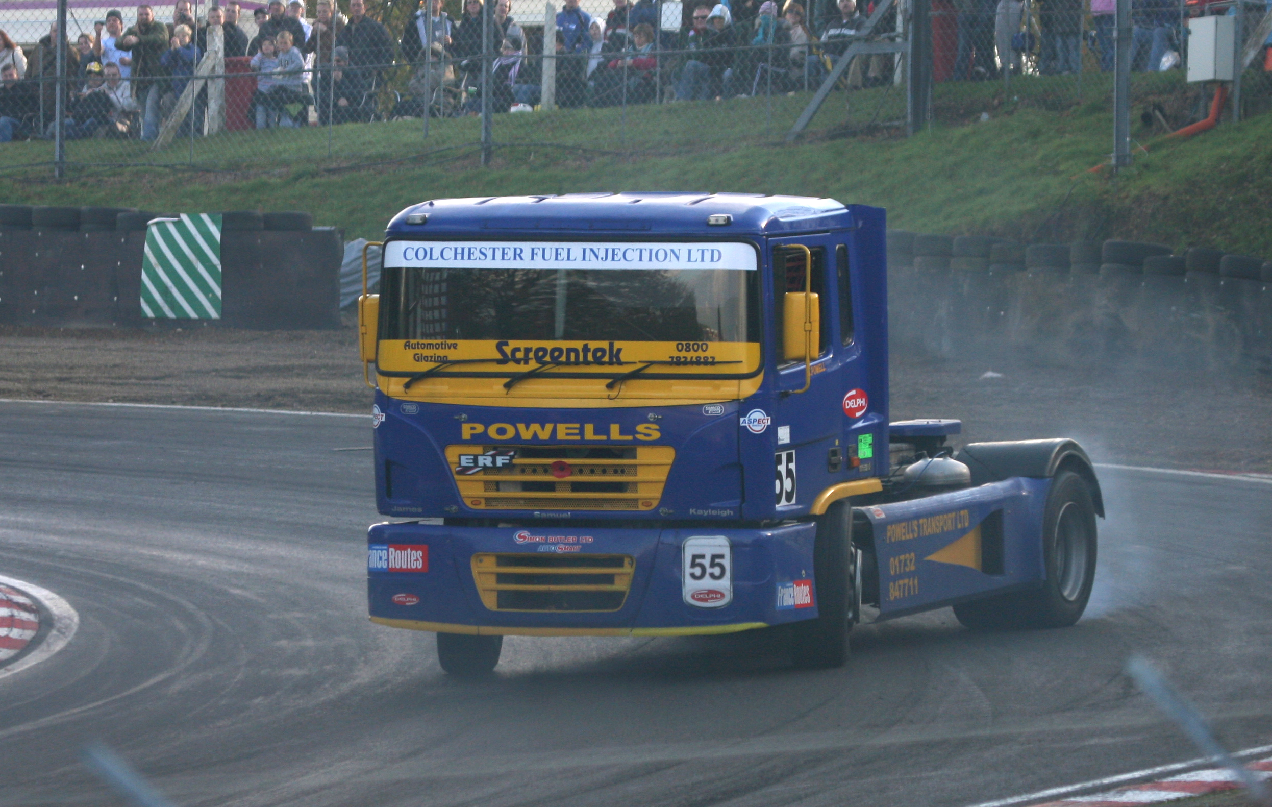 Opposite lock